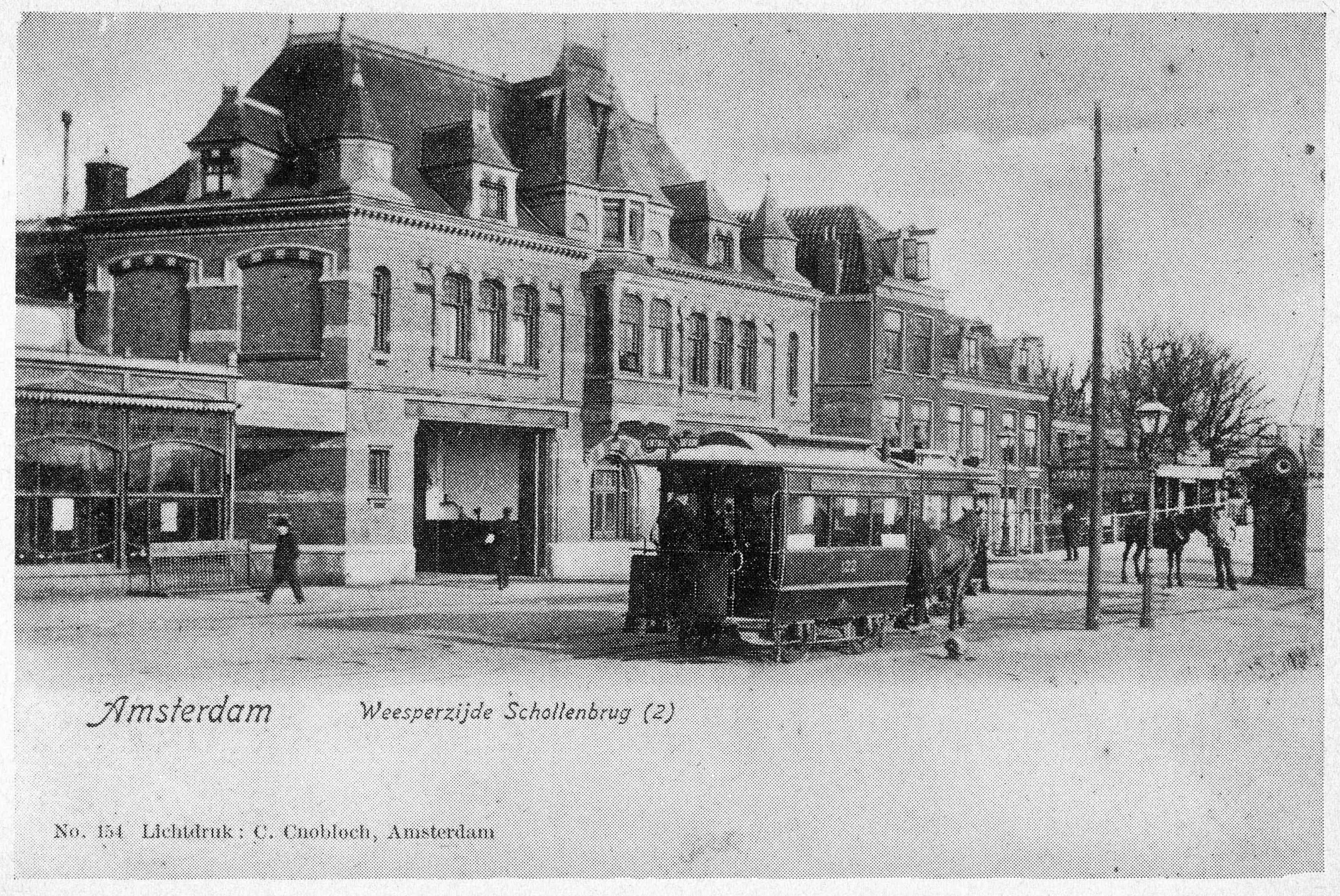 Photographed in Amsterdam between 1900 and 1914.